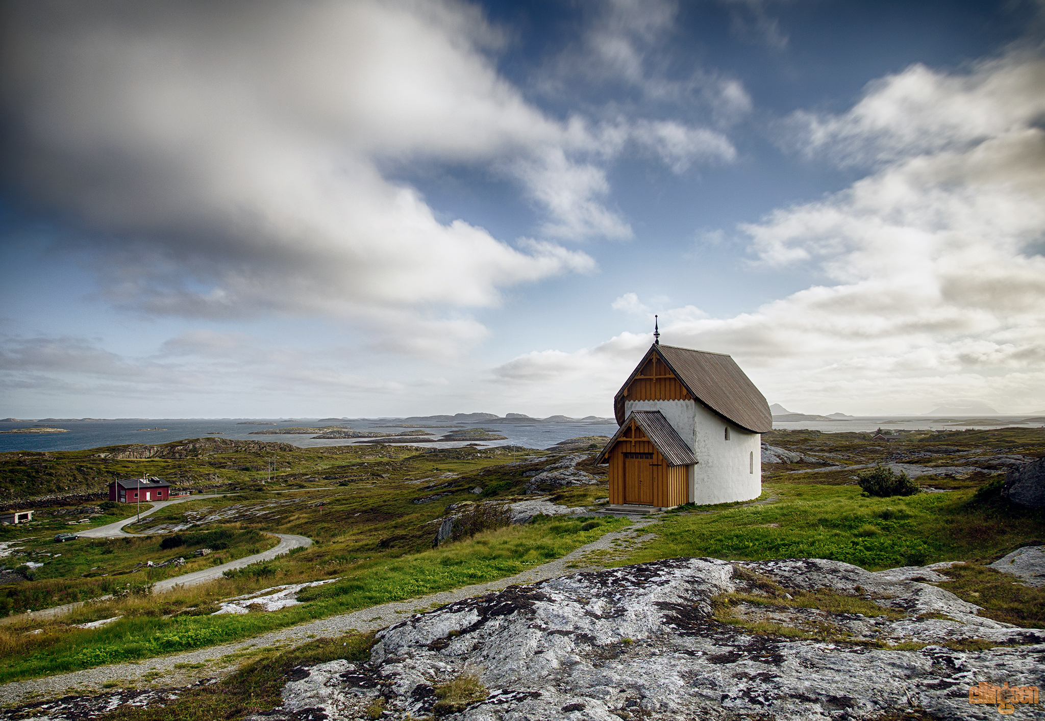 Petter Dass-kapellet på Husøy i Træna kommune, Norge